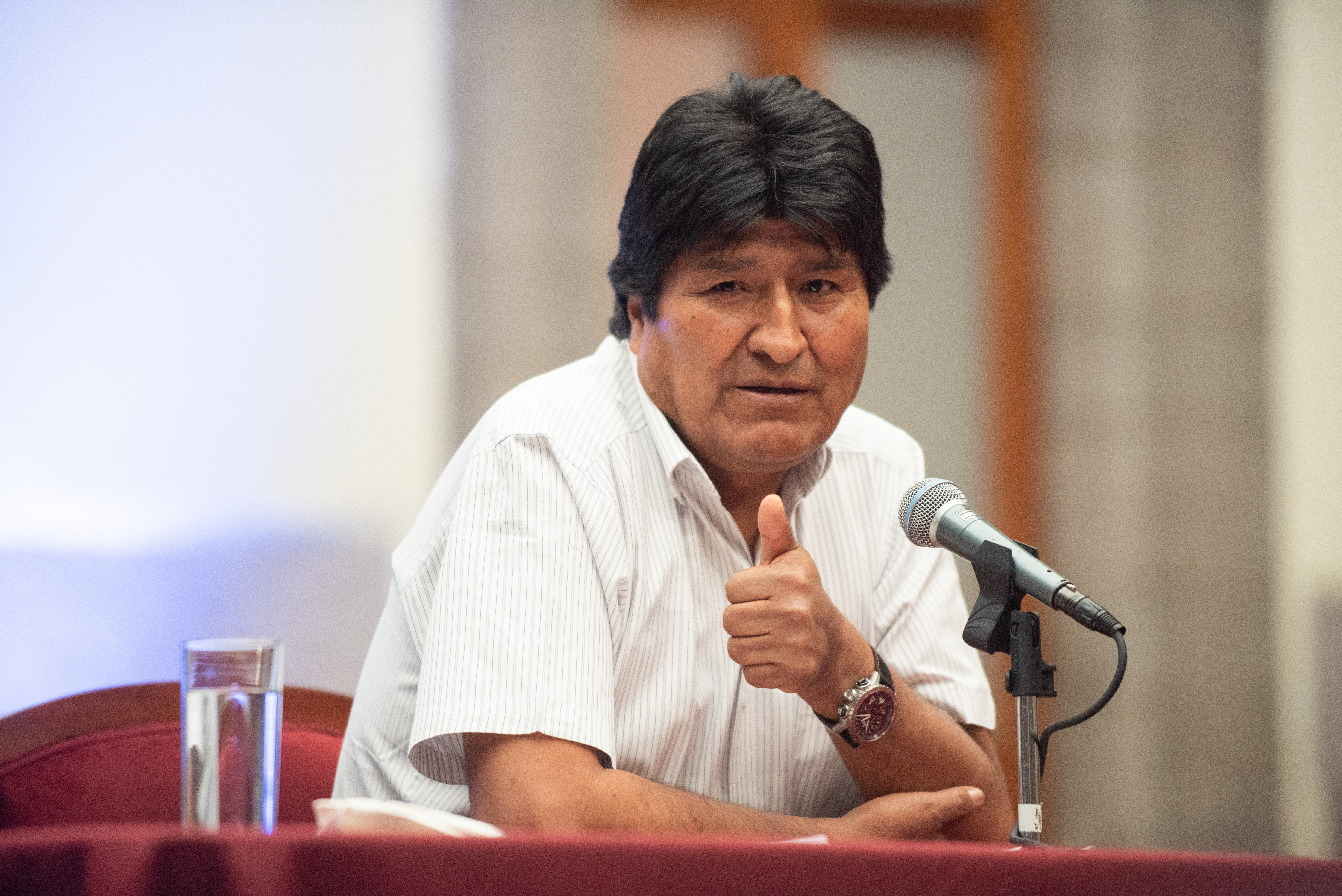 El político boliviano en conferencia de prensa en el Museo de la Ciudad de México.